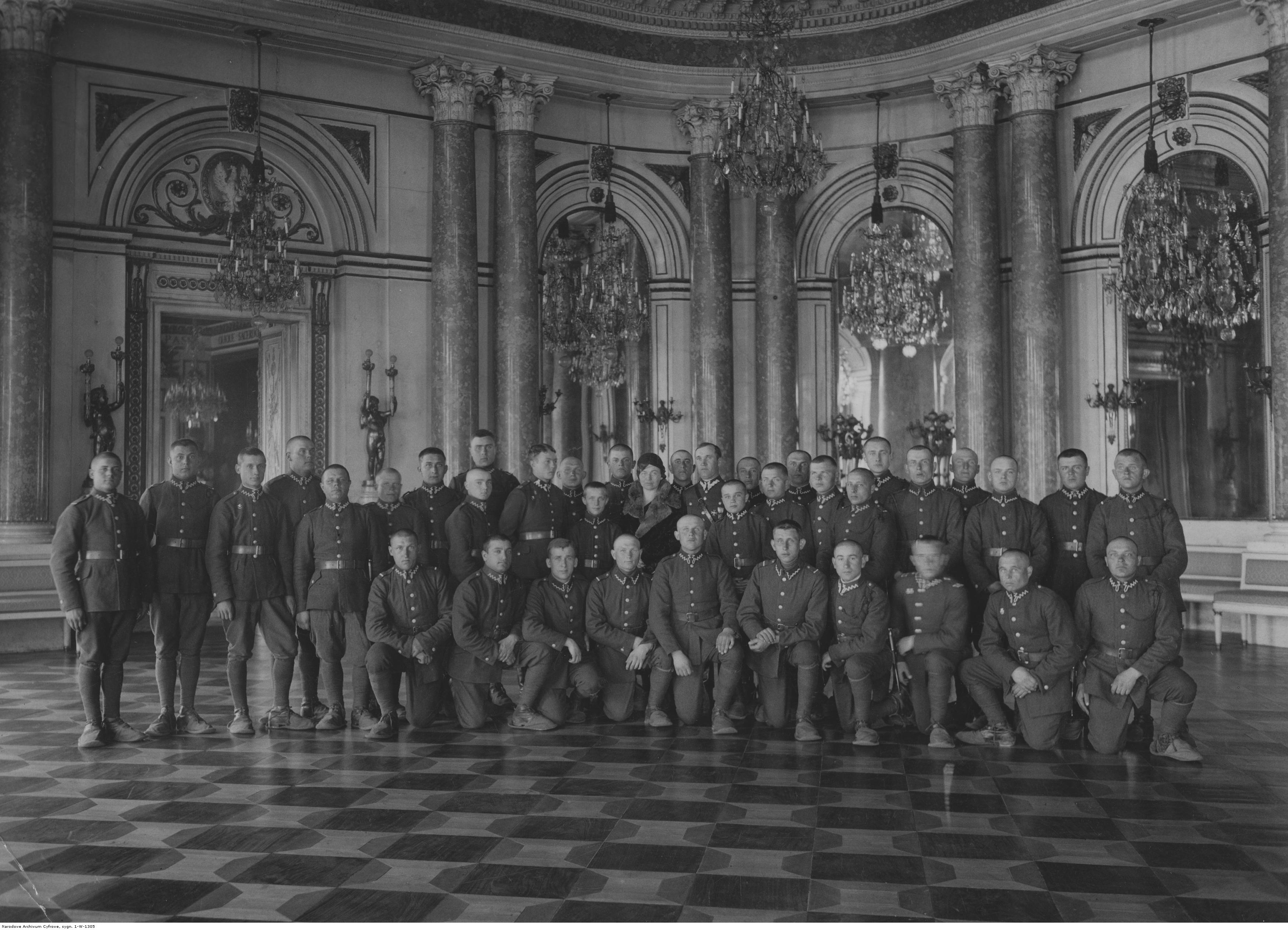 Żołnierze 80 pułku piechoty na Zamku Królewskim w Warszawie - fotografia grupowa w sali Zamku; maj 1935. Koncern Ilustrowany Kurier Codzienny - Archiwum Ilustracji. Sygnatura: 1-W-1305